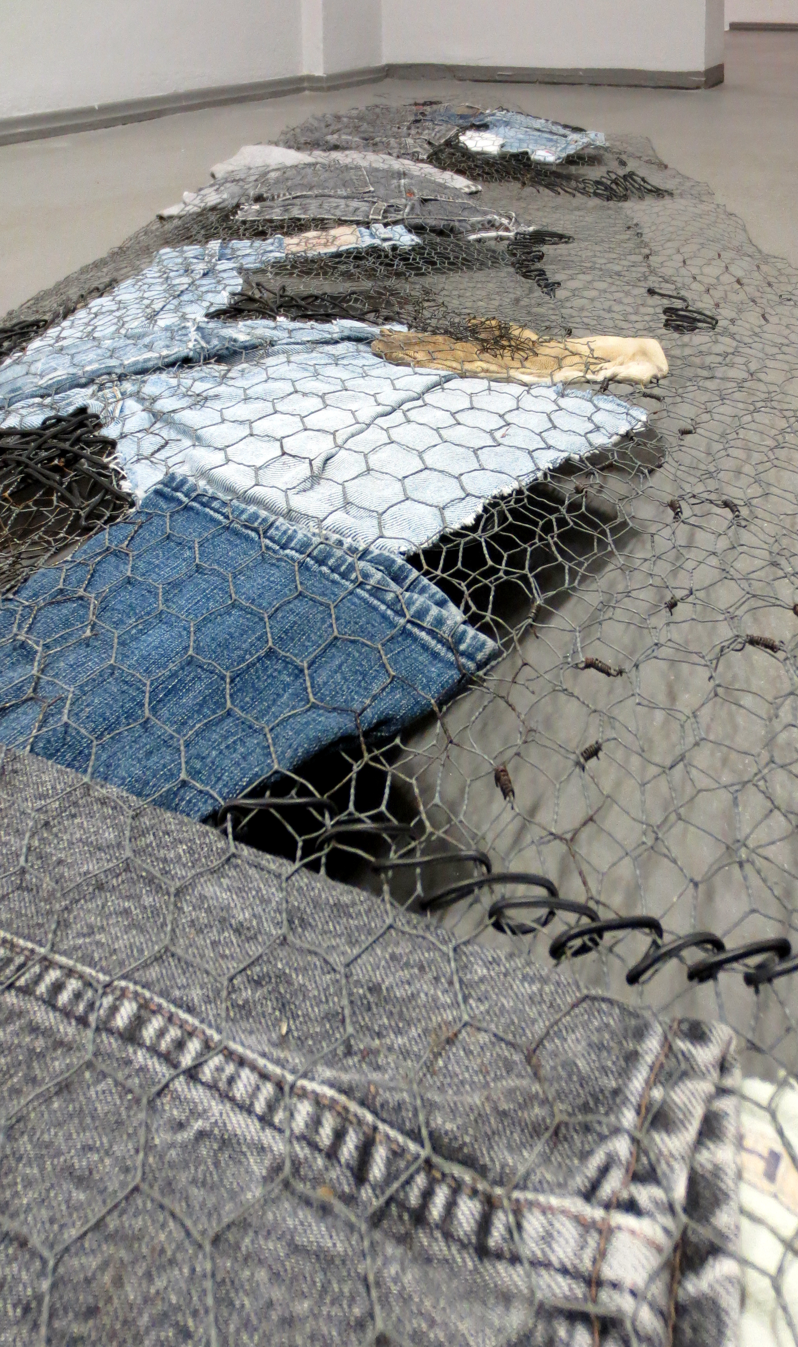 Christa Jeitner Jeansdraht